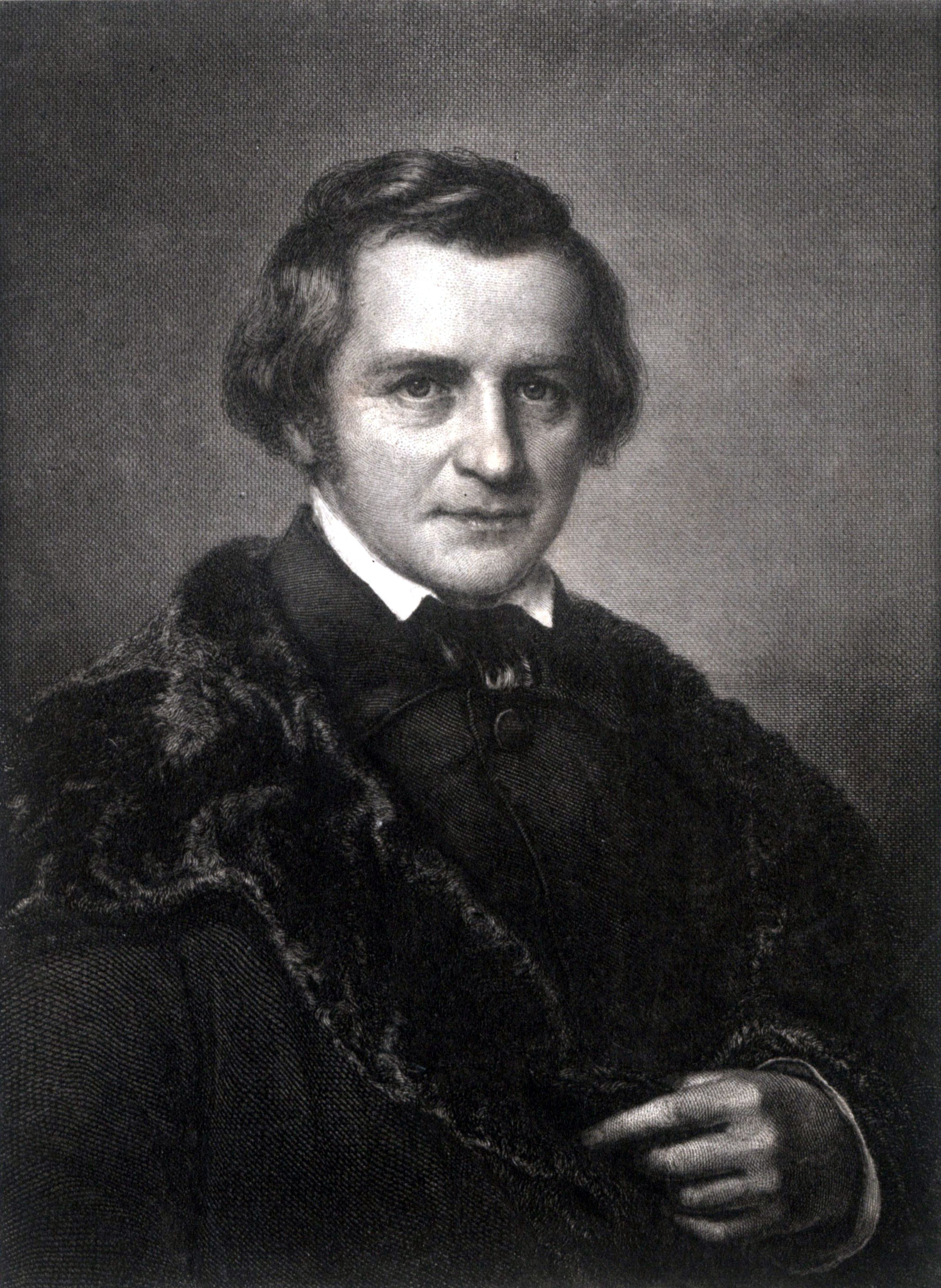 Karl August von Hase (1800-1890), deutscher evangelischer Theologe